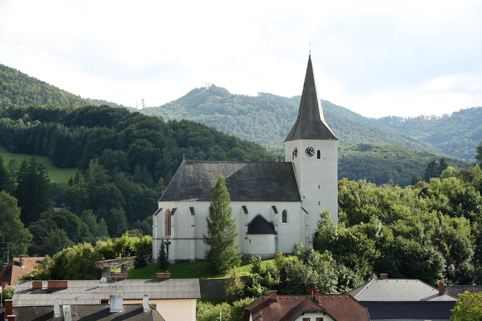 Nordansicht der Pfarrkirche in der niederösterreichischen Gemeinde Kaumberg